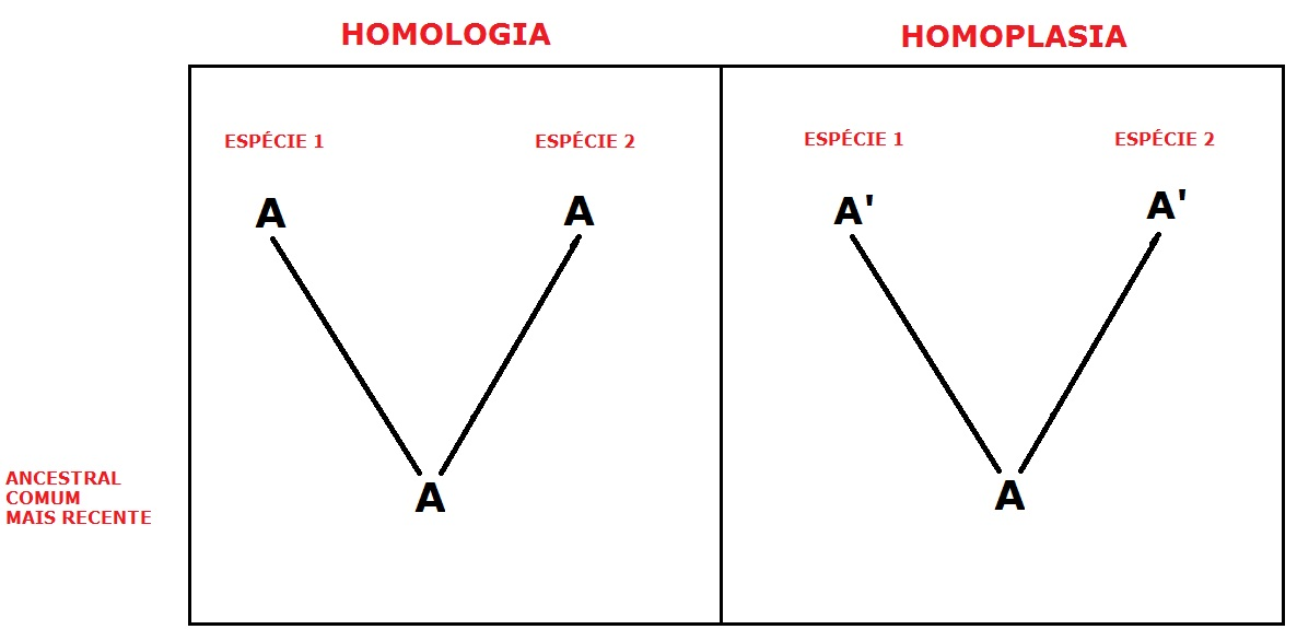 Caracteres homólogos e homoplásicos